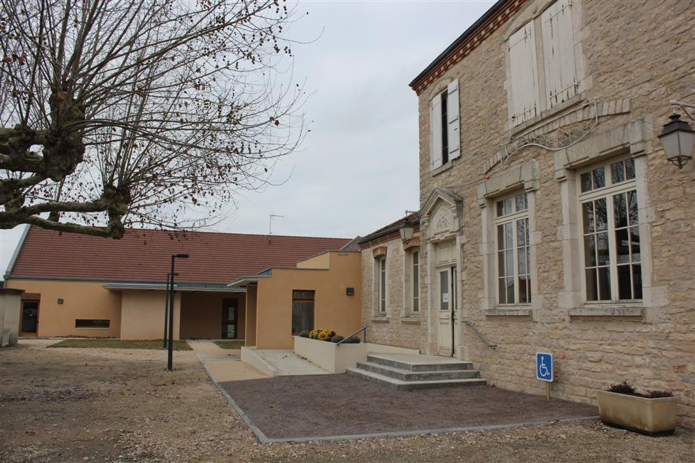 Mairie de Lans, 71. Sur la gauche l'annexe, inaugurée en janvier 2012.